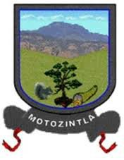 escudo